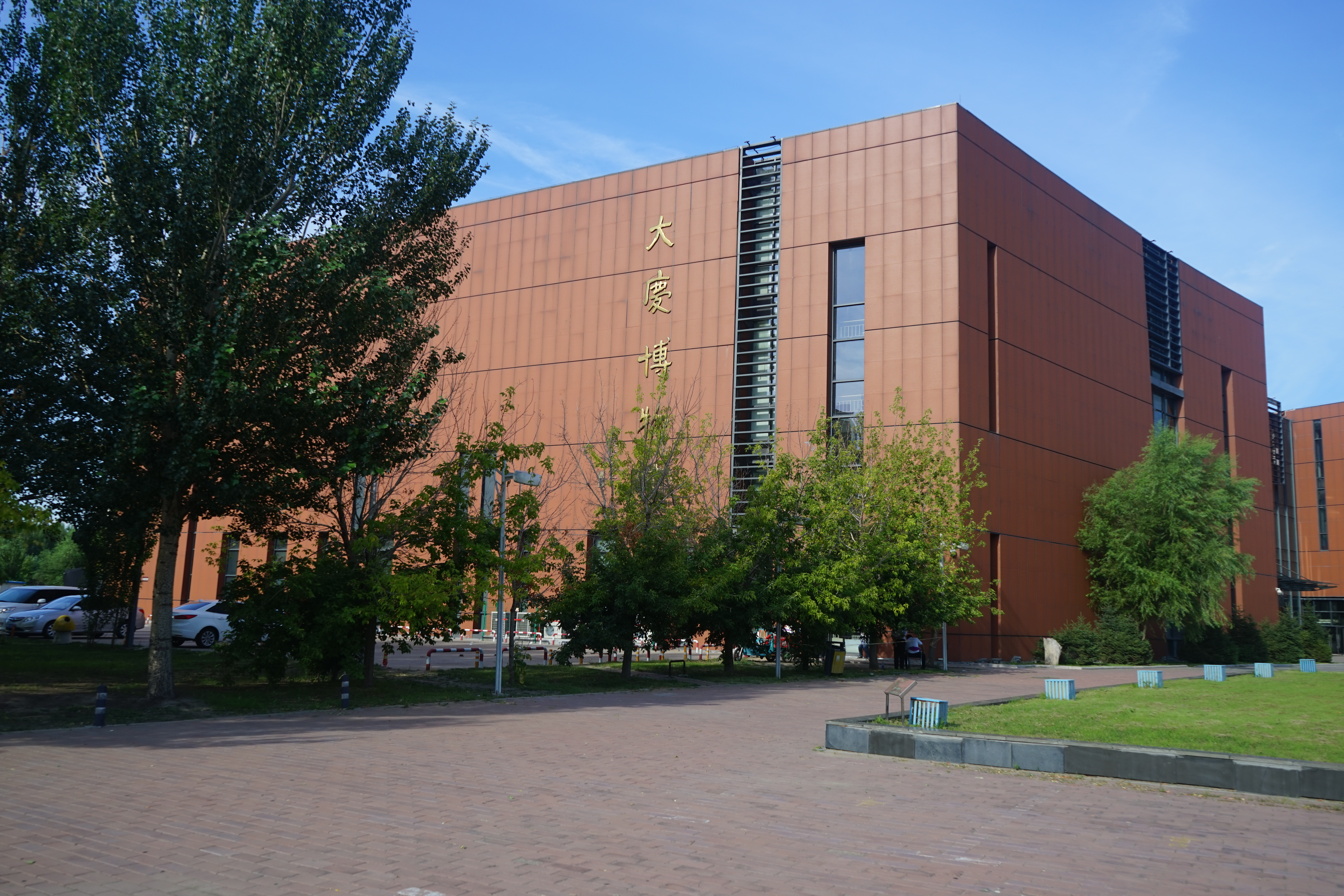 中文（中国大陆）: 大庆博物馆侧面